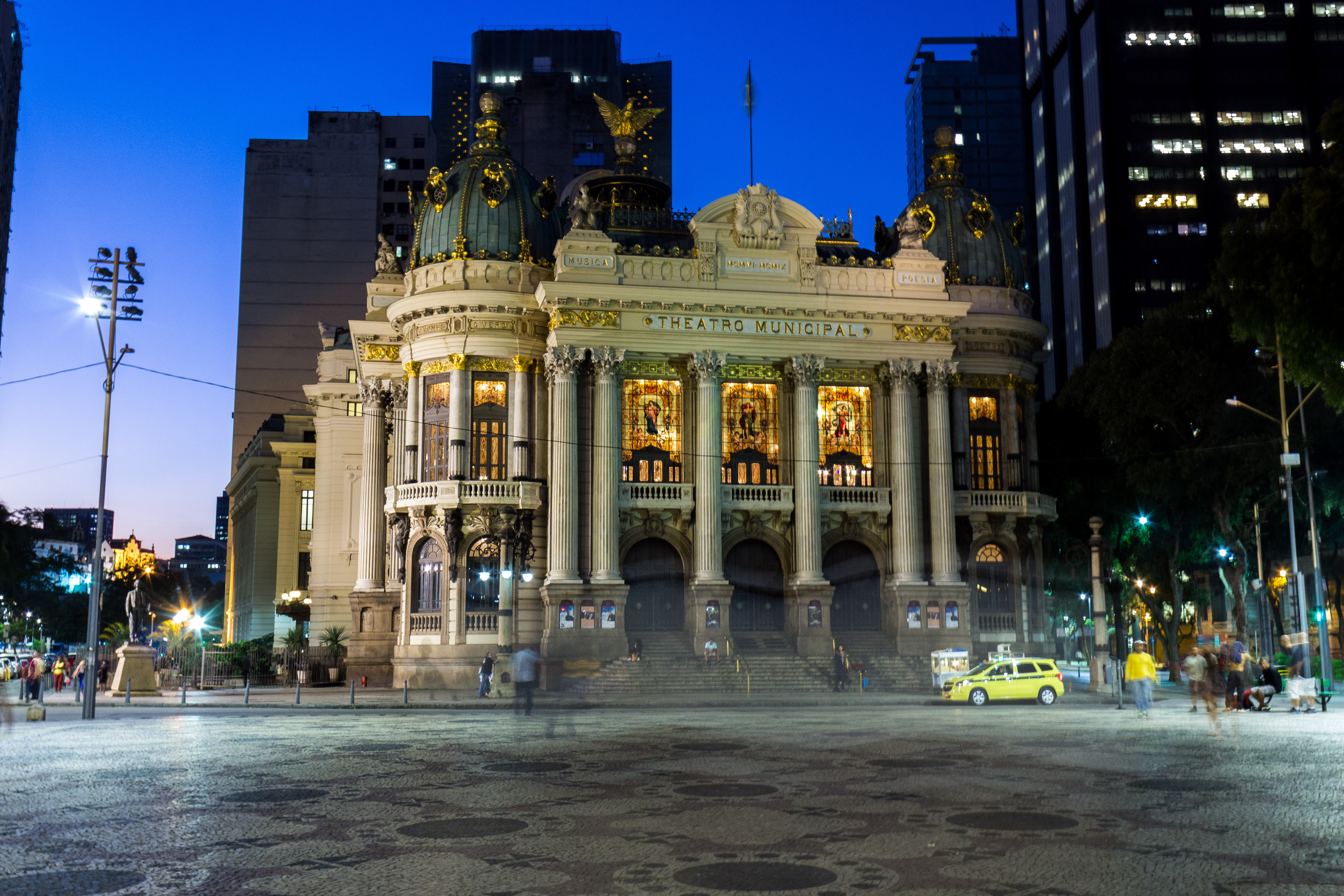 Teatro Municipal: prédio; vista frontal